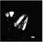 Conusphaera mexicana mexicana. Un Nanolito del Jurásico Sup. Ref=1 μm.Crédito: Biol. Aldo Avila